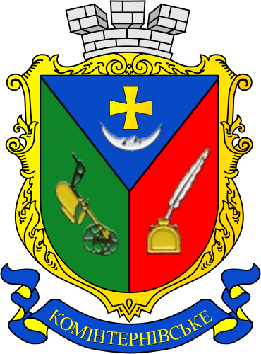 Герб смт. Комінтернівське, Одеської області. Версія, яка існувала до перейменування смт у Доброслав, яке відбулося 14.07.2016 р.